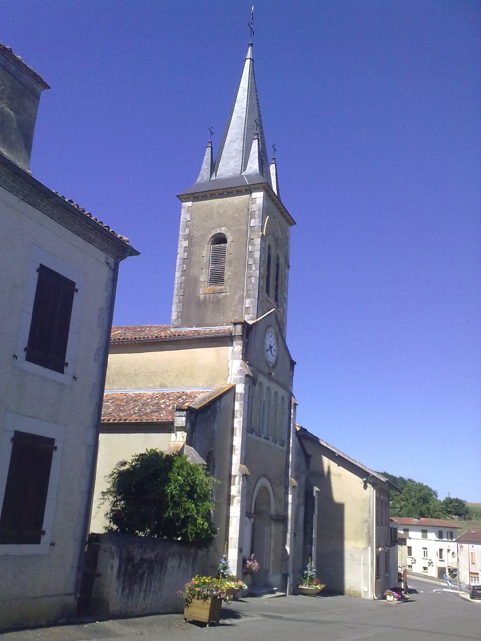 Momuy le 18 juillet 2010, France.